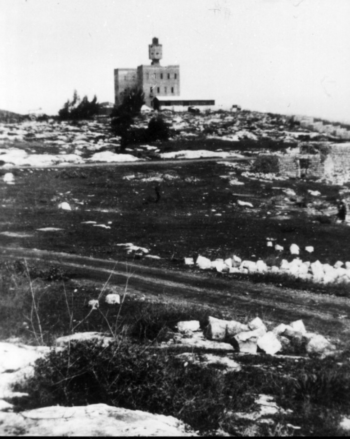 חטיבת יפתח - הגדוד השלישי - 1 - נבי יושע - הקרב על המצודה - נבי יושע , אחד המבצרים שנכבשו ע"י פלוגה ג'